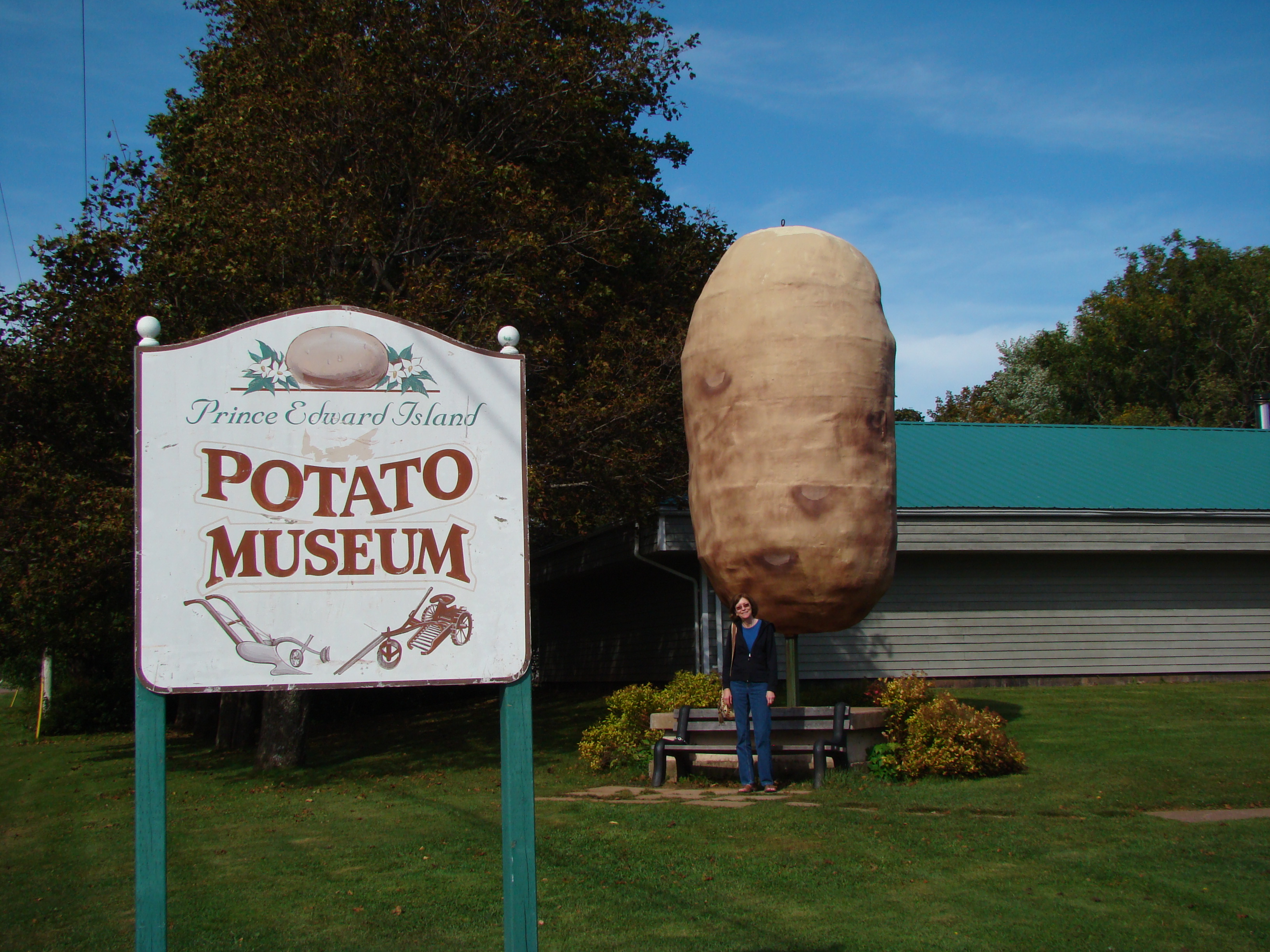 PEI Potato Museum